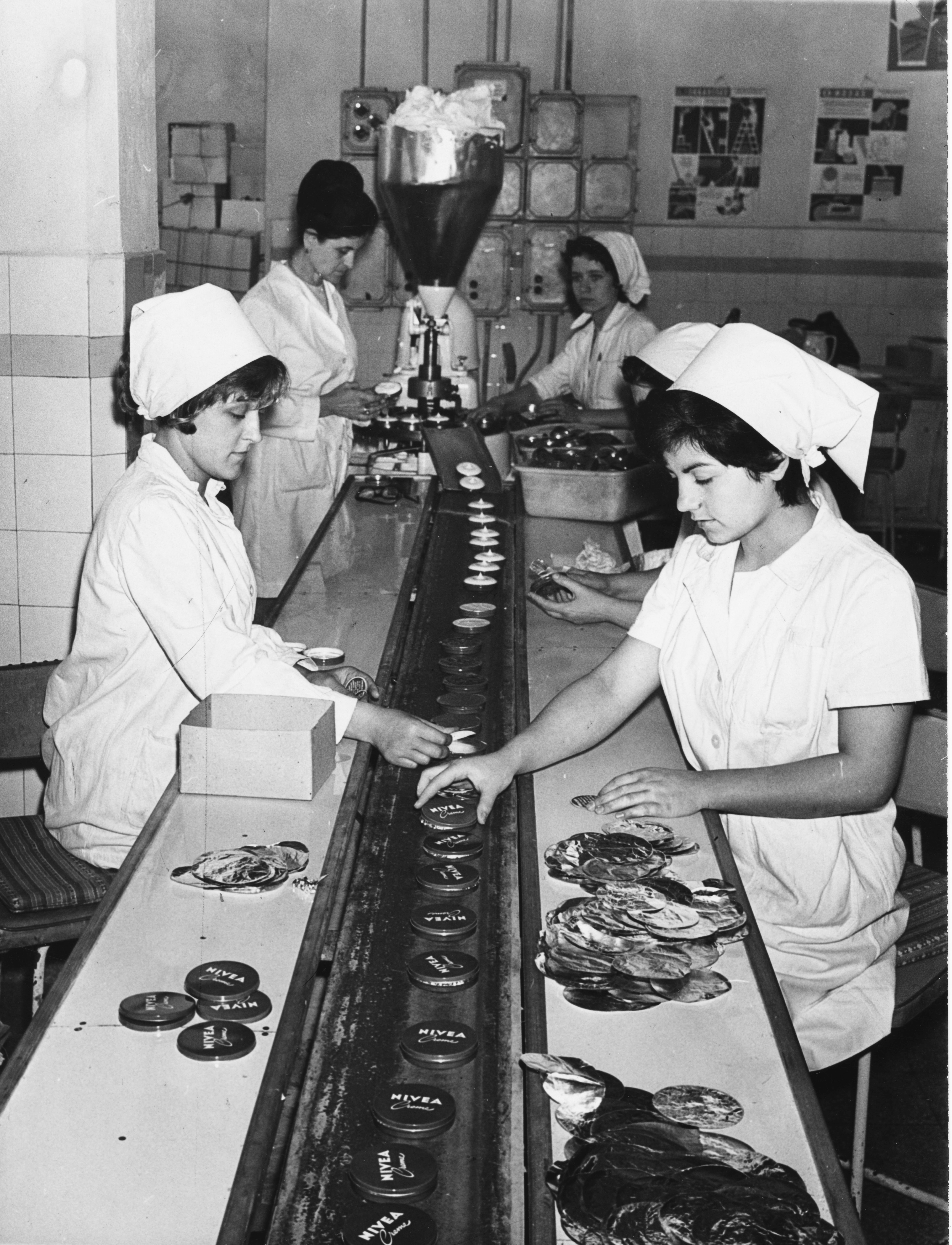 Nivea krém, szállítószalag